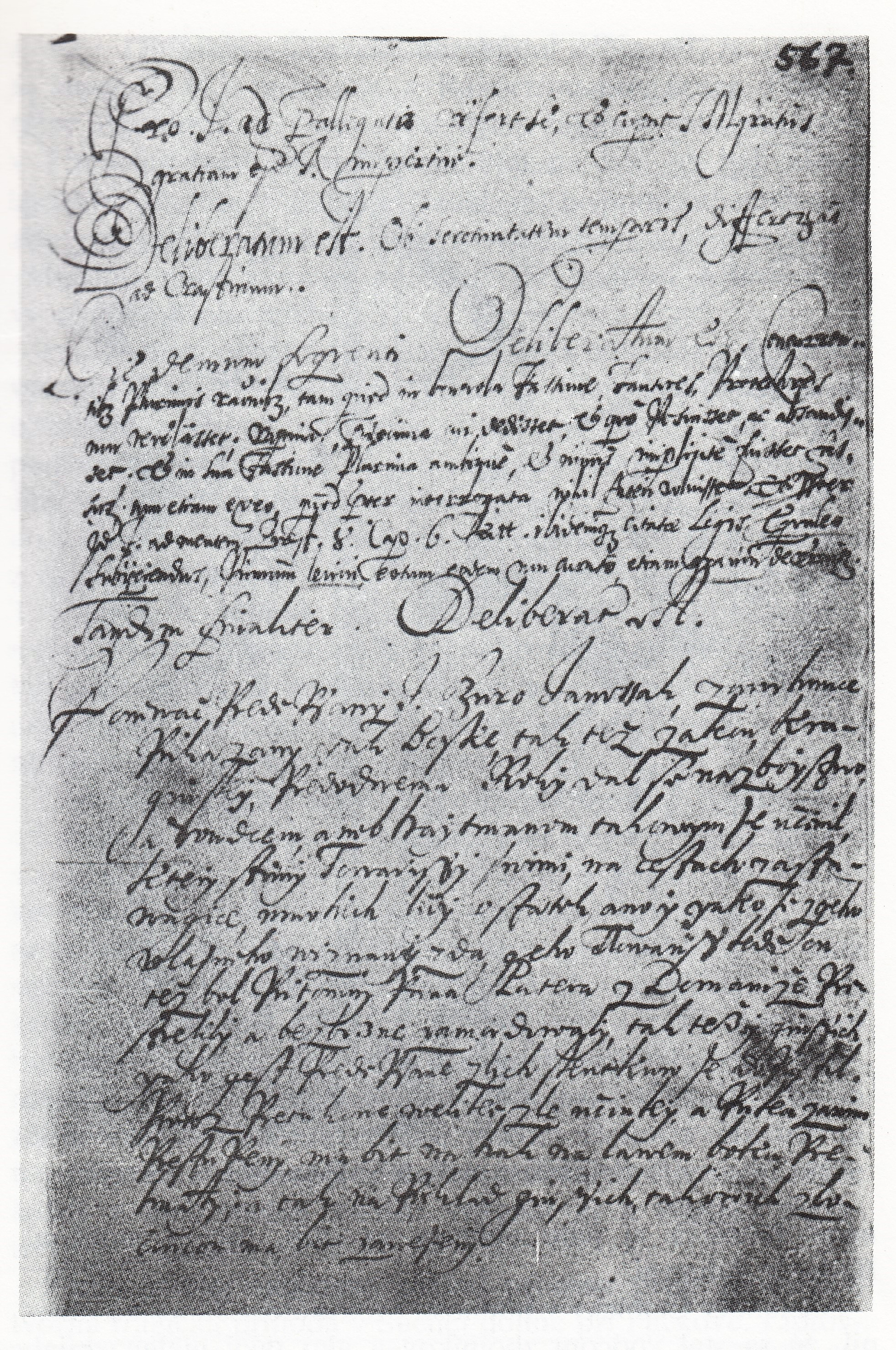 Slovenský zbojník Juraj Jánošík, legendárny národný hrdina, bol súdený v roku 1713 v Liptovskom Mikuláši. Potrestaný bol obesením na hák. Faksimile jeho rozsudku.